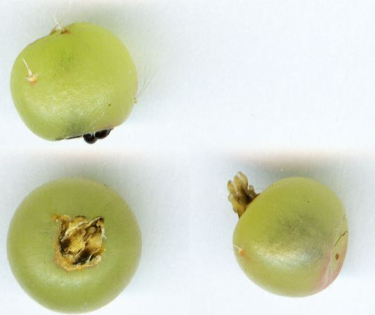 Rhipsalis baccifera(Rhipsalideae; Cactaceae; Planta) kaktusz termése